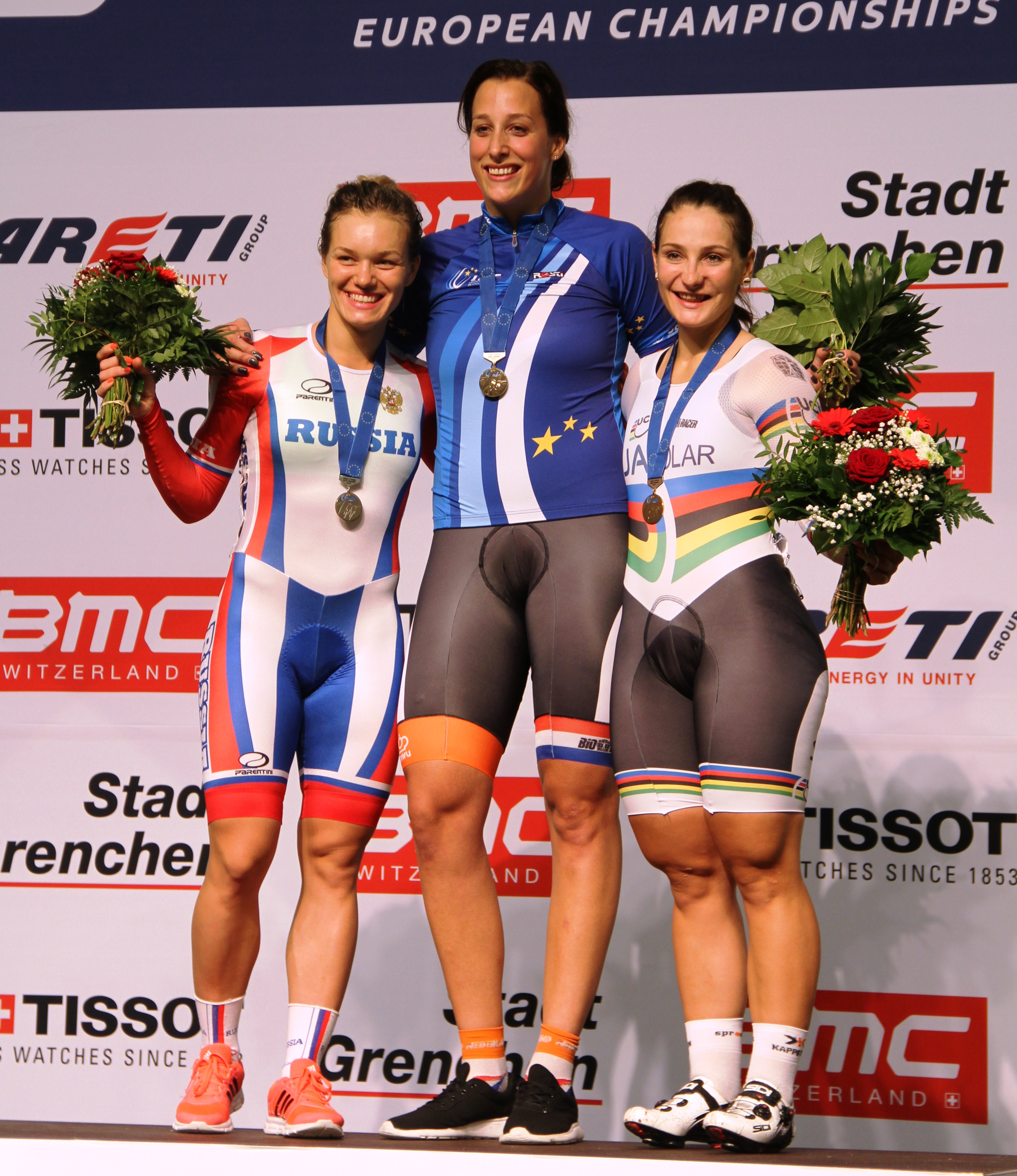 Podium Sprint der Frauen (v.l.n.r.): Anastasiia Voynova, Elis Ligtlee, Kristina Vogel The making of this document was supported by the Community-Budget of Wikimedia Germany.